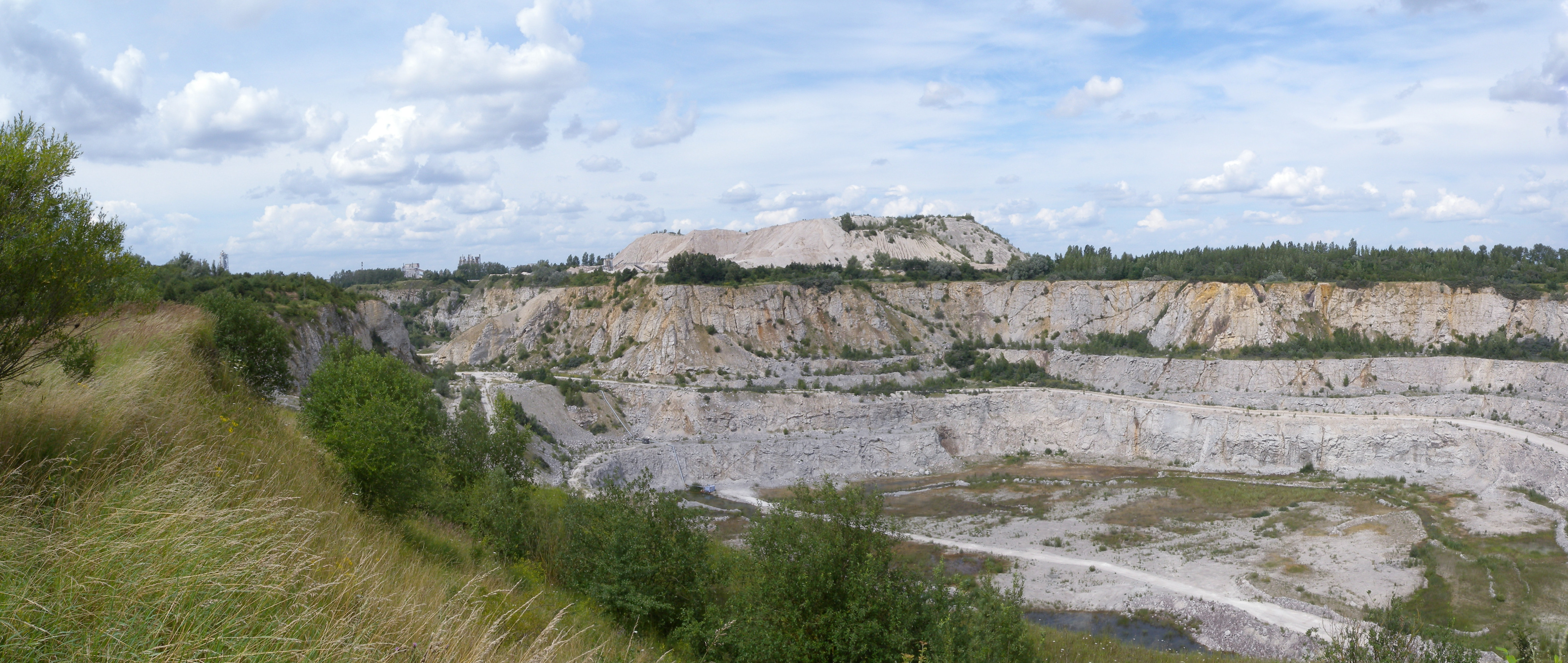 Kamieniołom Wapienno Bielawy